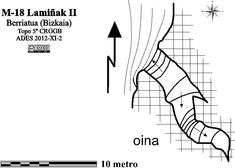 Lamiñak II kobazuloaren topografia ADES Espeleologia Elkartearen arabera.